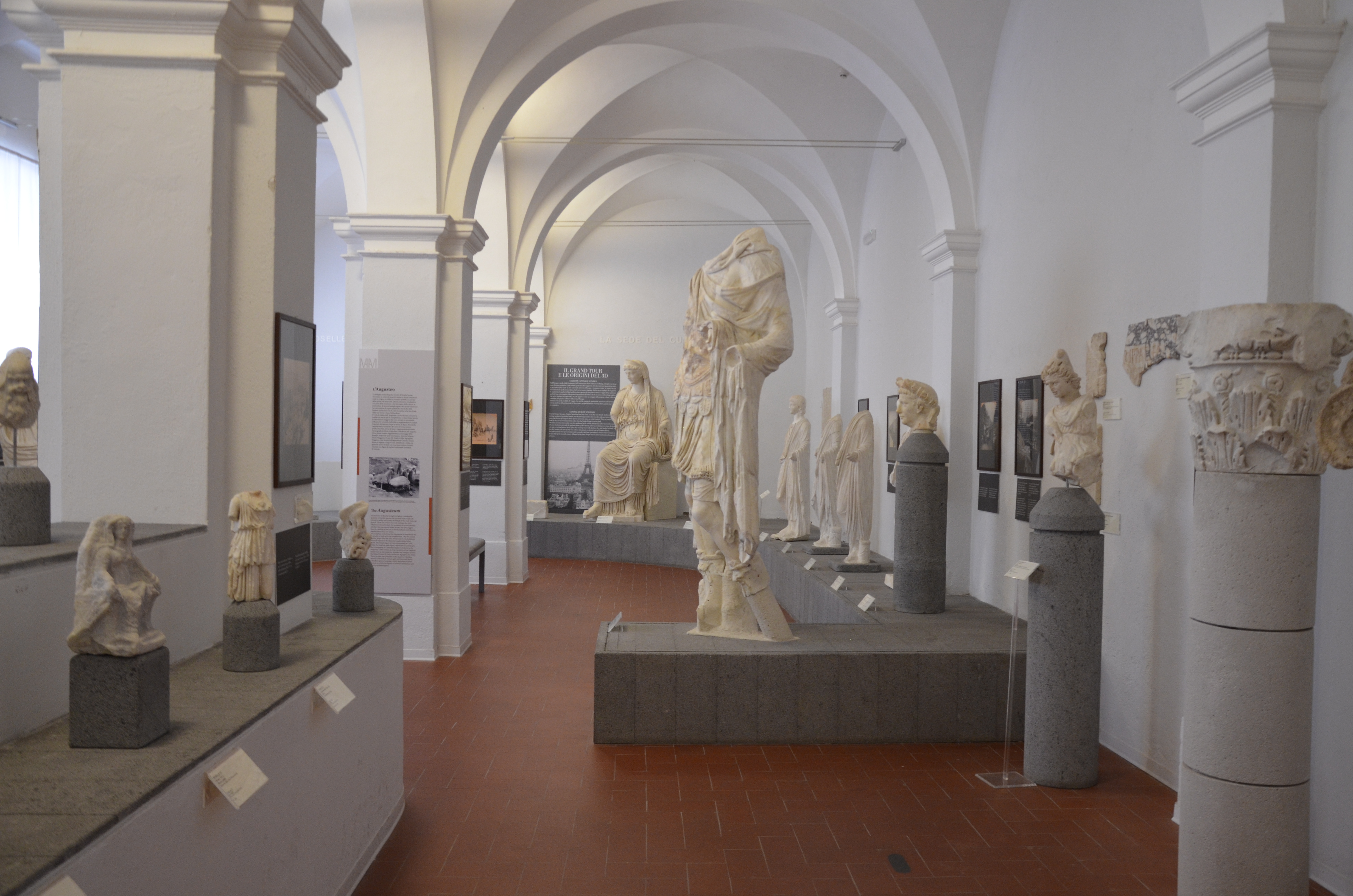 Museo Archeologico e d'Arte della Maremma, Grosseto, Tuscany, Italy